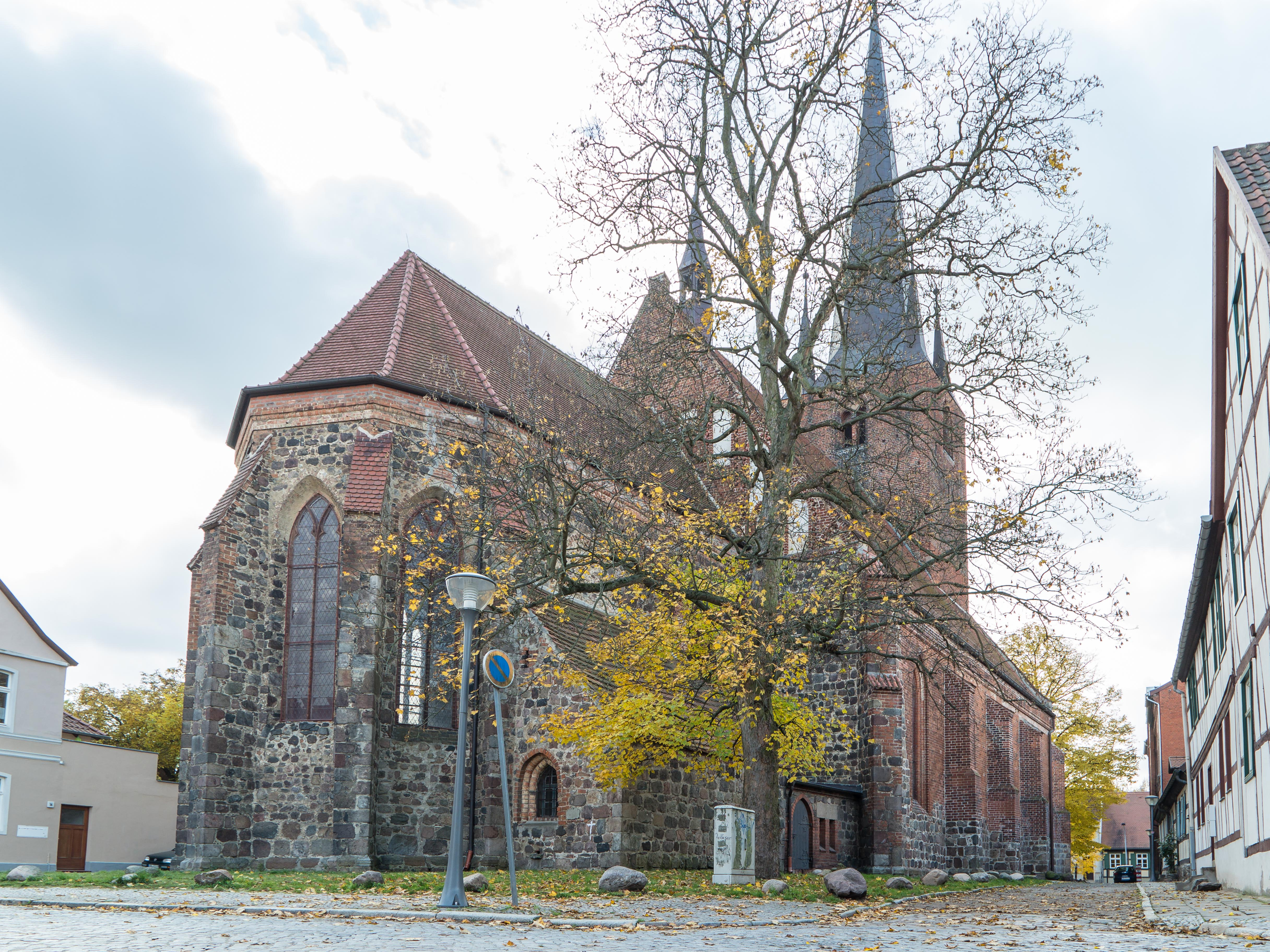 St. Petri-Kirche in Stendal